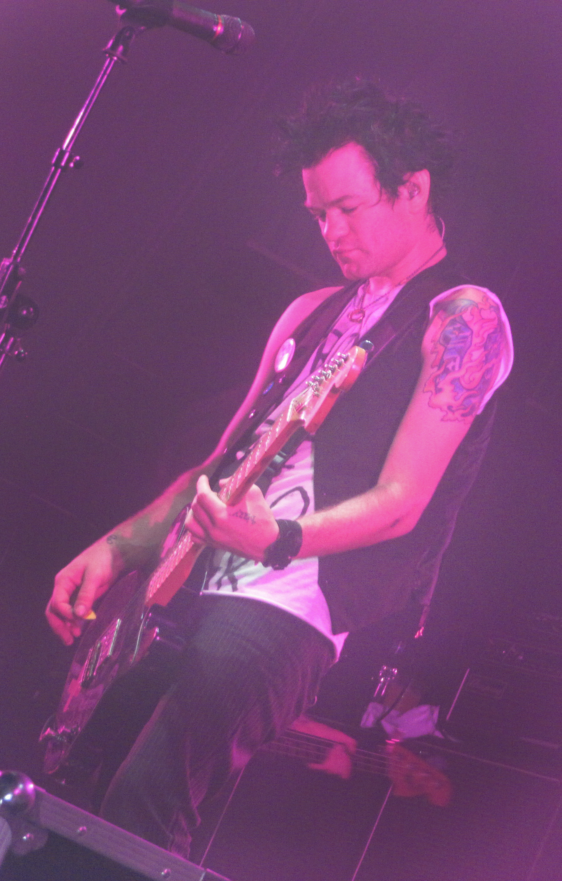 Выступление Sum 41 в Москве